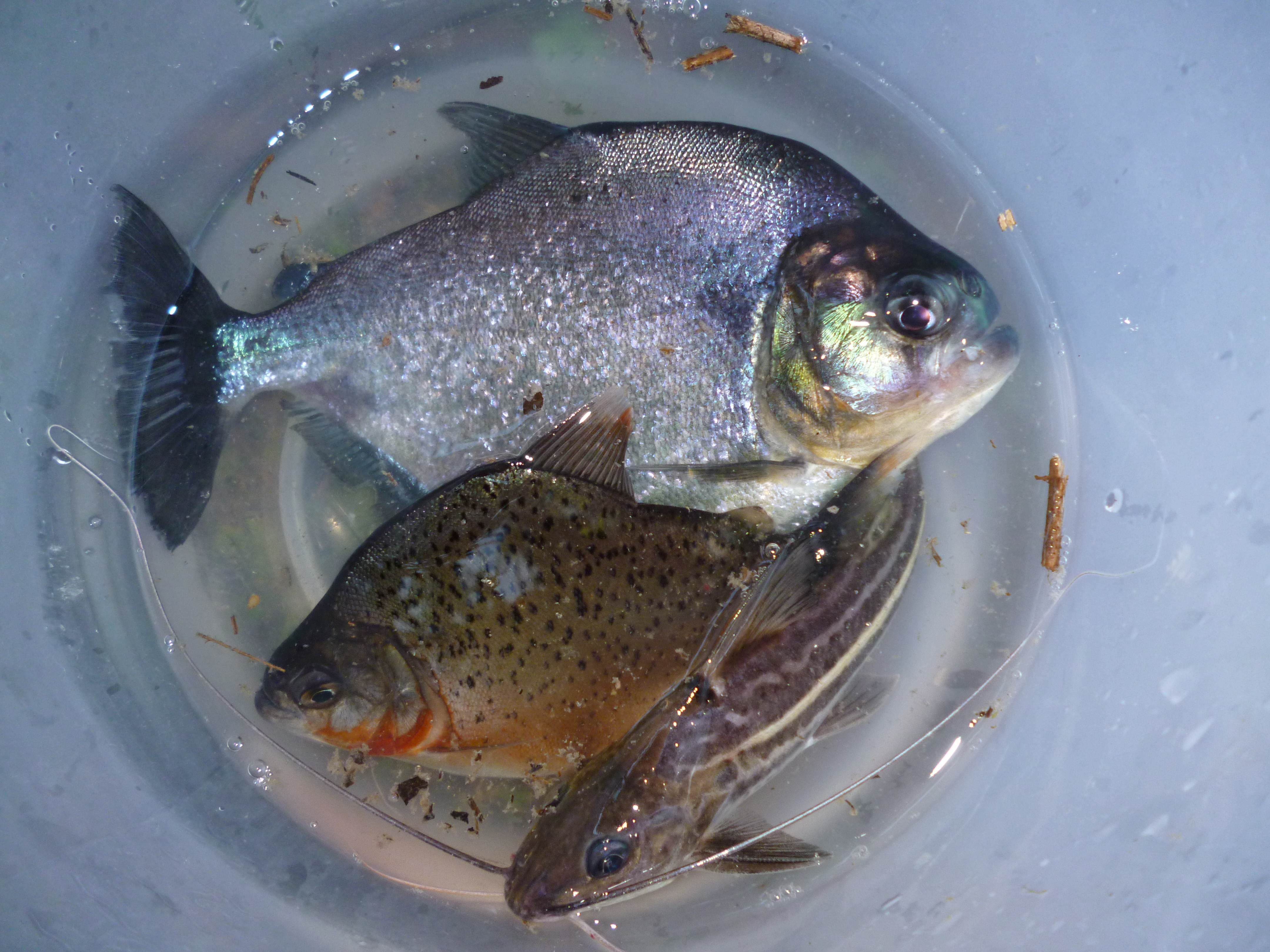 Peixe de tipo piranha vivendo no Rio Negro